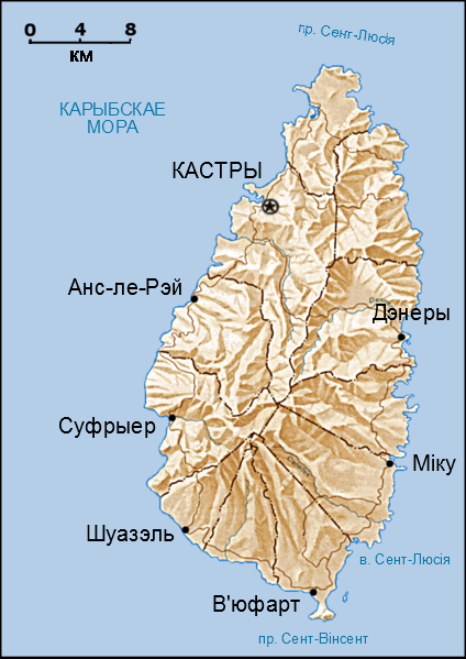 Карта Сент-Люсіі